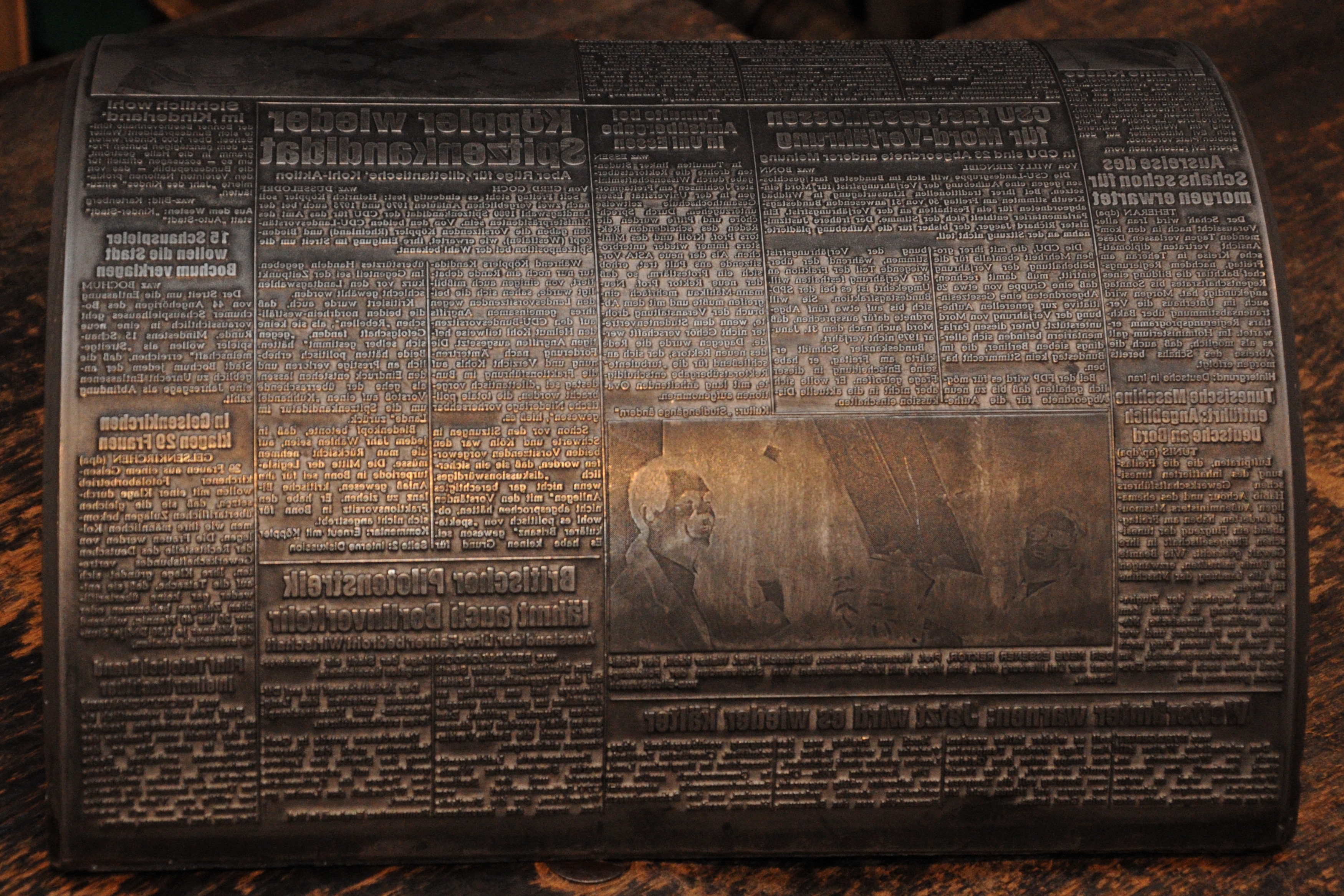 DASA – Arbeitswelt Ausstellung